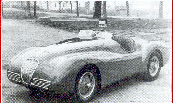 "the first" Bandini tratta da Libro: Bandini (storia della vita e automobili di Ilario Bandini)